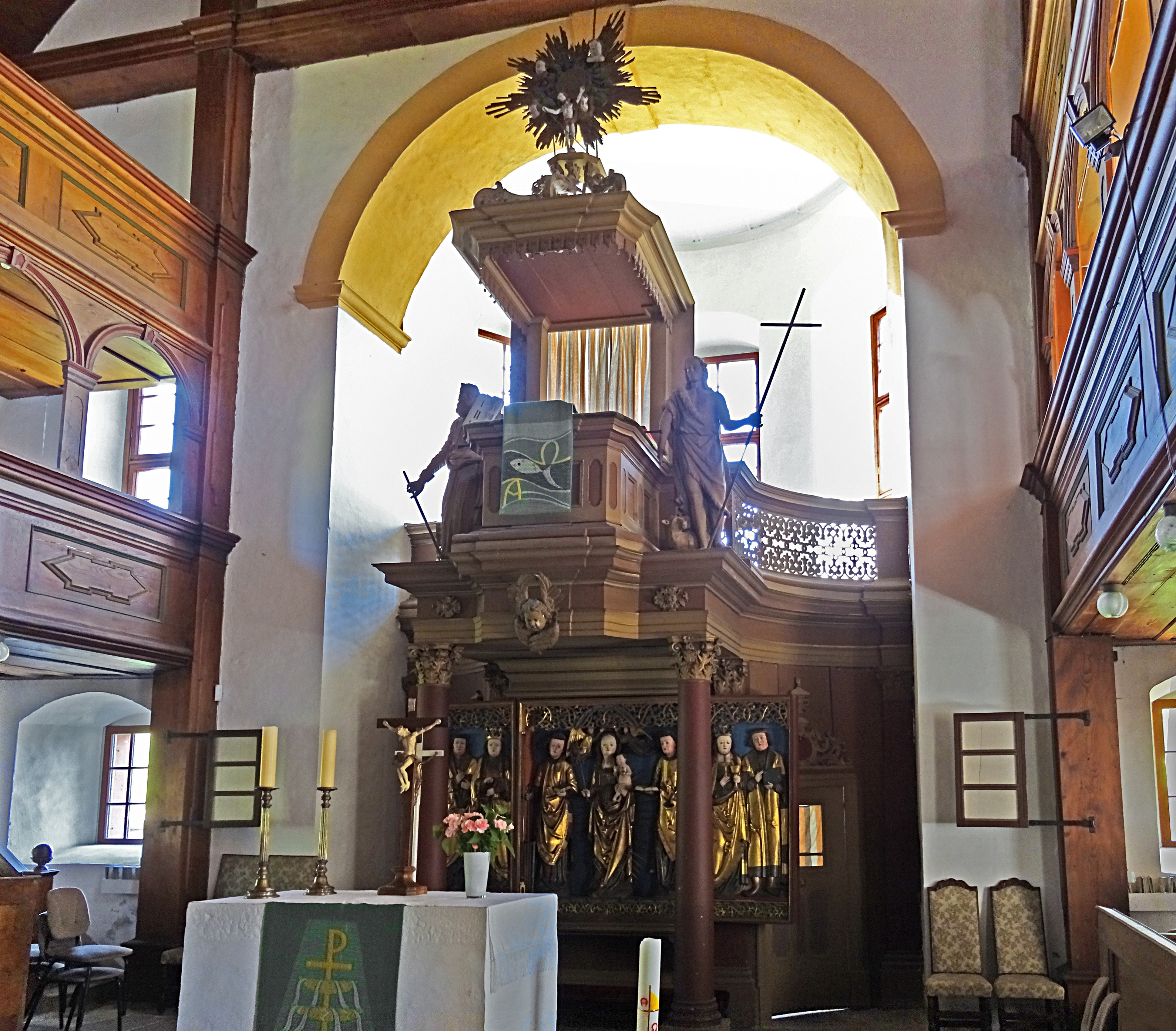 St. Laurentius Kanzelaltar und der Schnitzaltar aus der Zeit um 1500